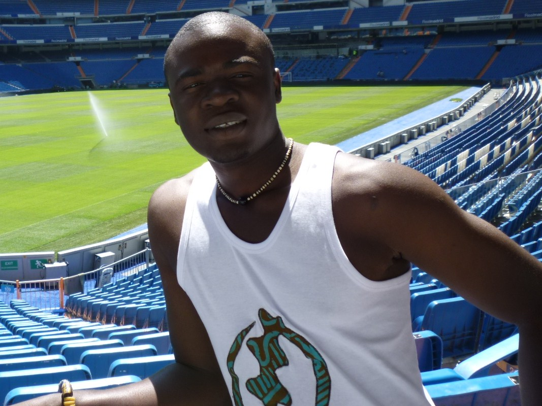 Eric Adjetey Anang at Santiago Bernabeu stadium. Madrid, 2009.